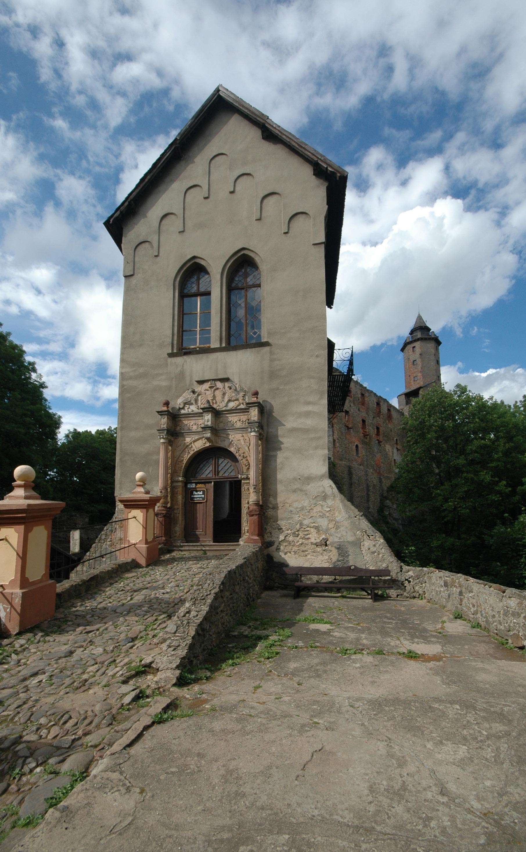 Grodno Castle